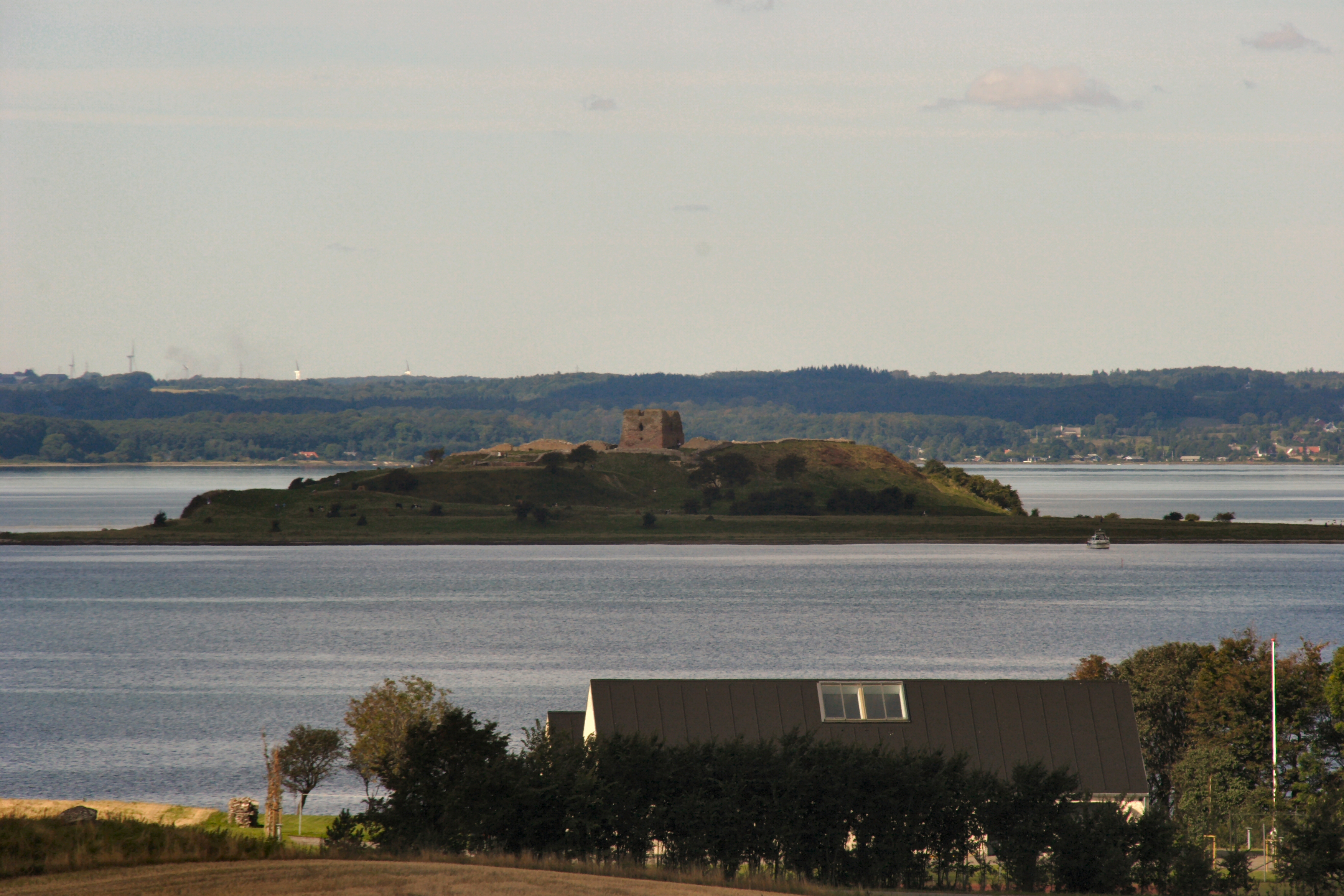 Kalø Slotsruin set fra Egens Kirke